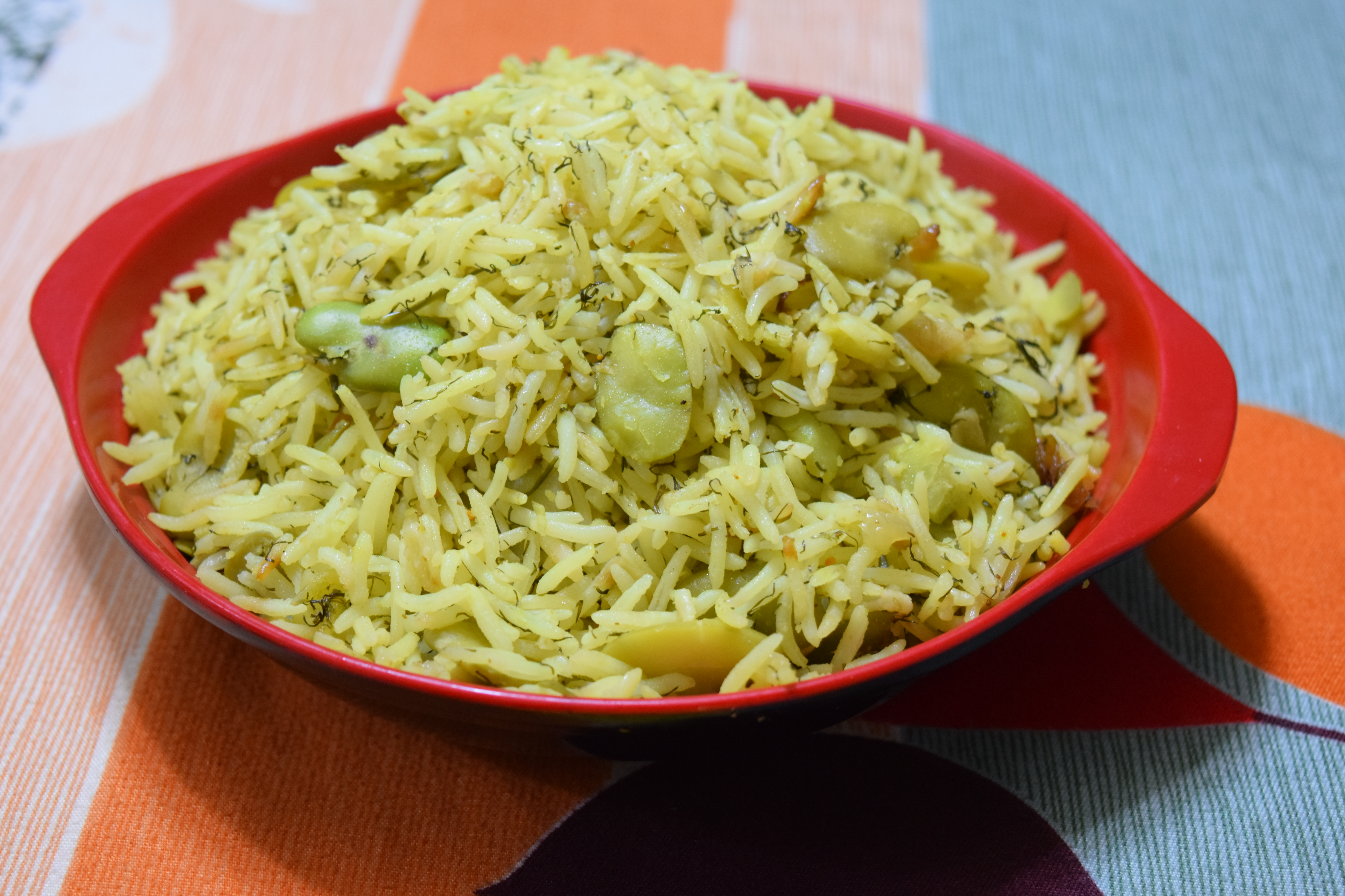 Traditional Iraqi dish, rice and beans with dill